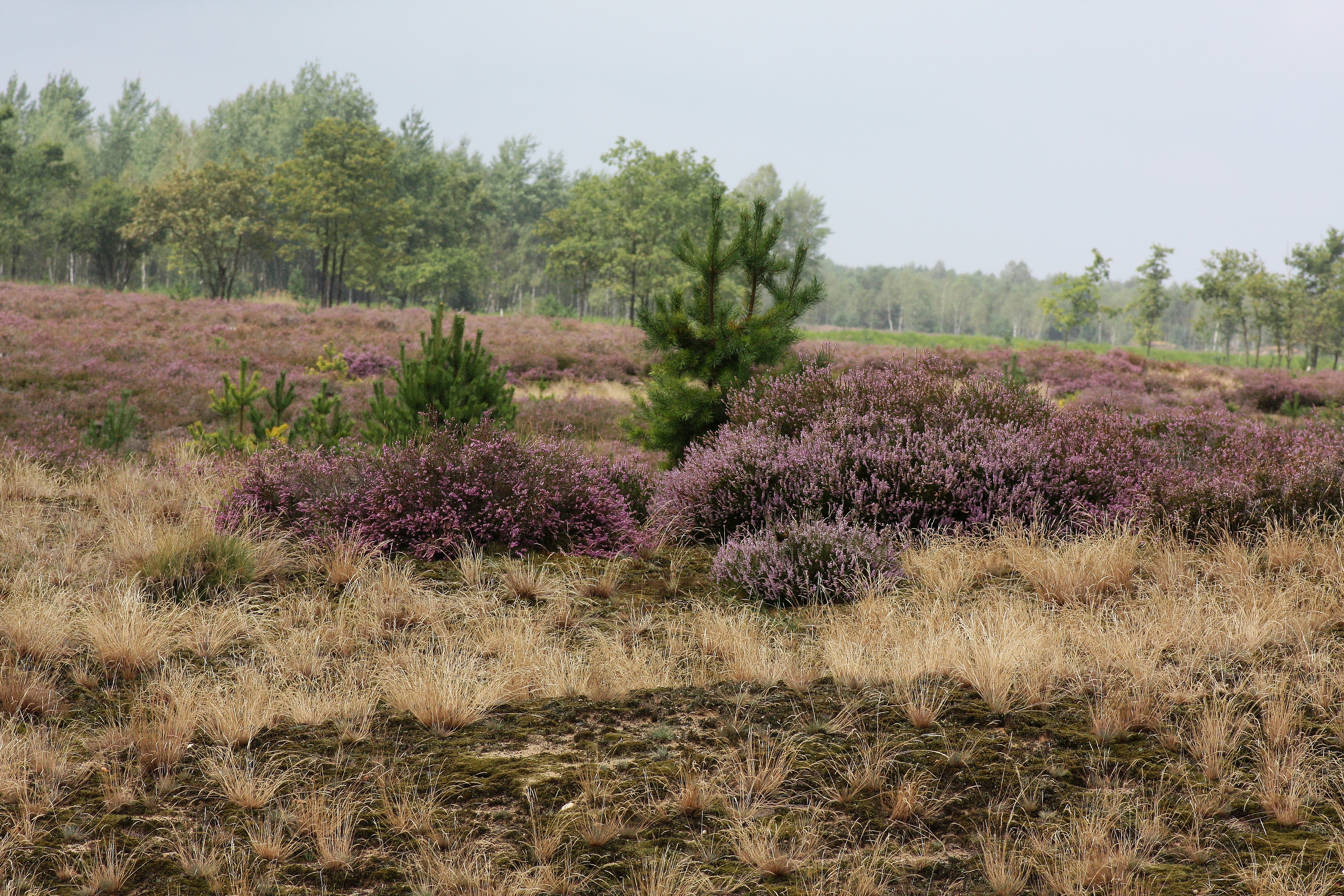 FFH-Gebiet Königsbrücker Heide zur Heideblüte 2016